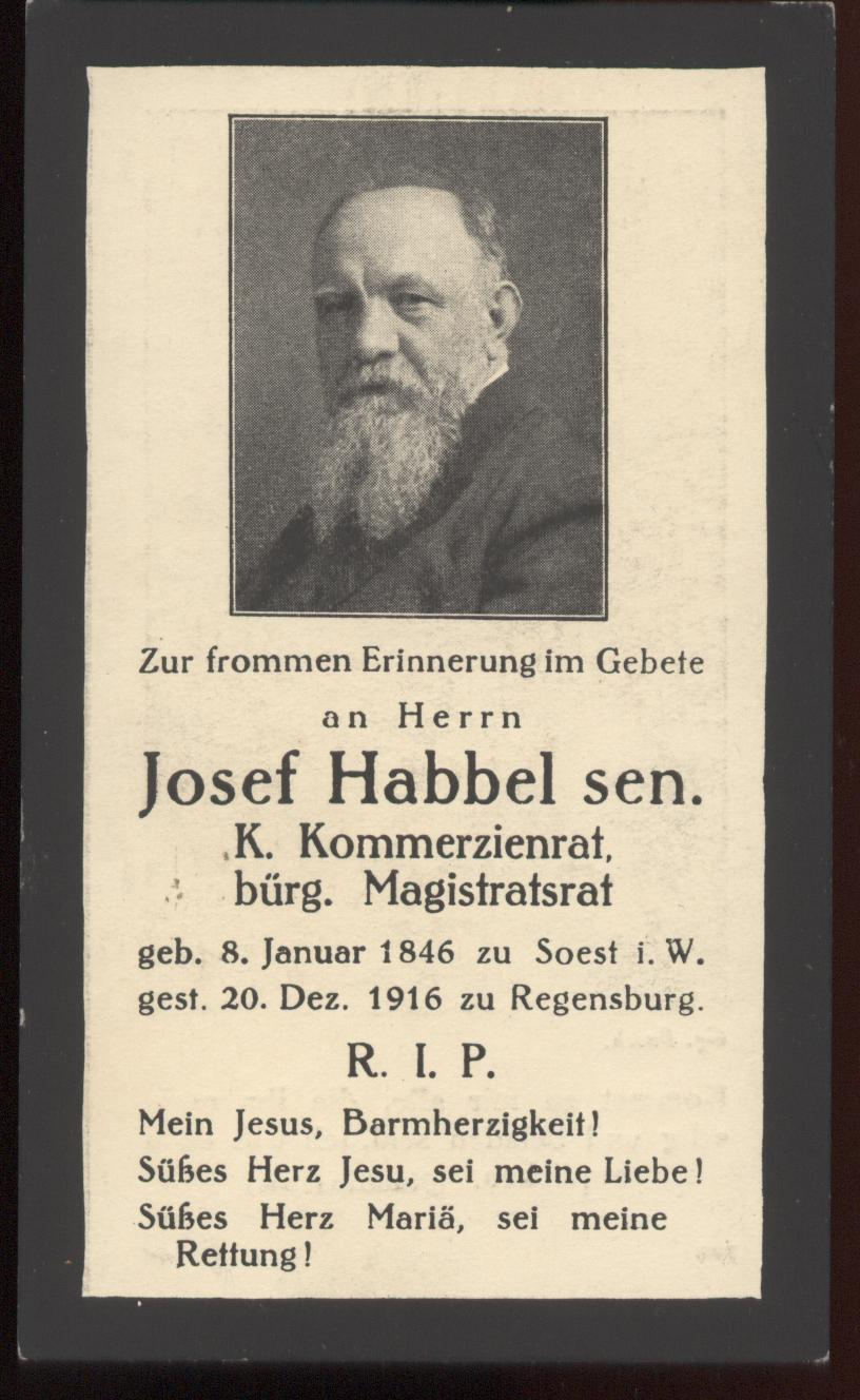 Josef Habbel, Verleger, Regensburg